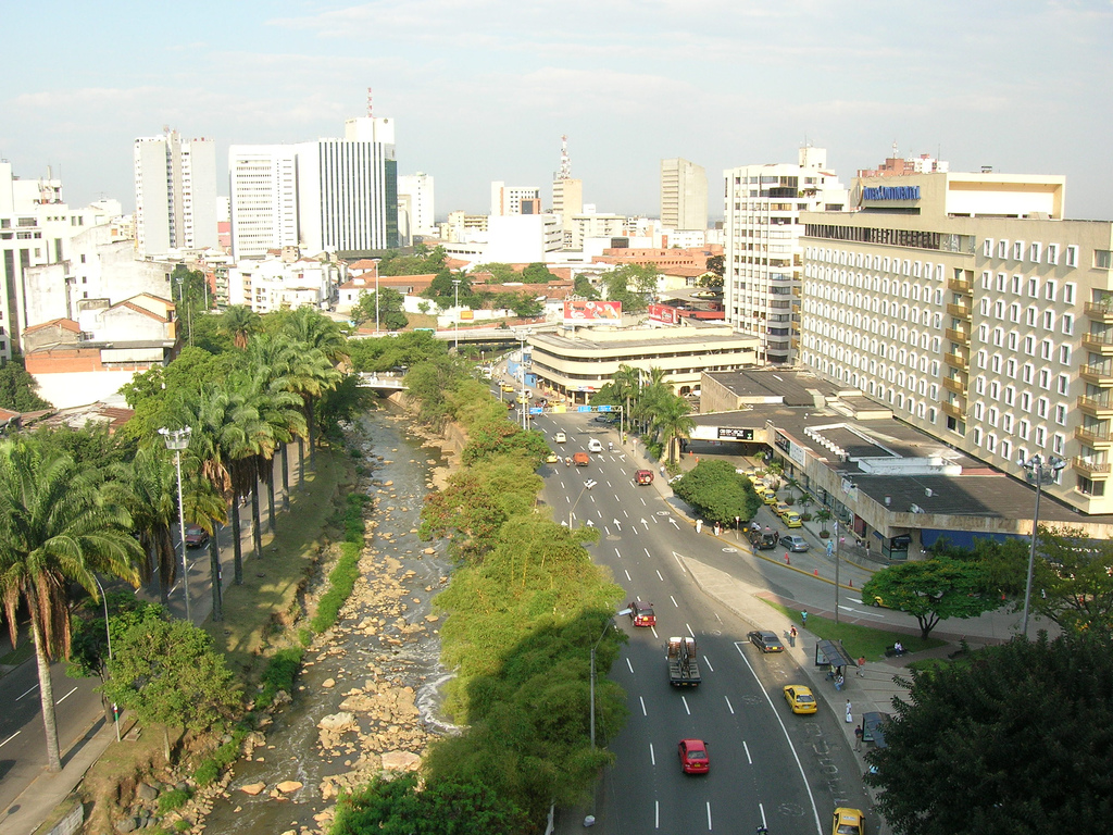 Foto tomada por Augusto Ilian del Rio Cali, la Av Colombia y el Hotel Inter